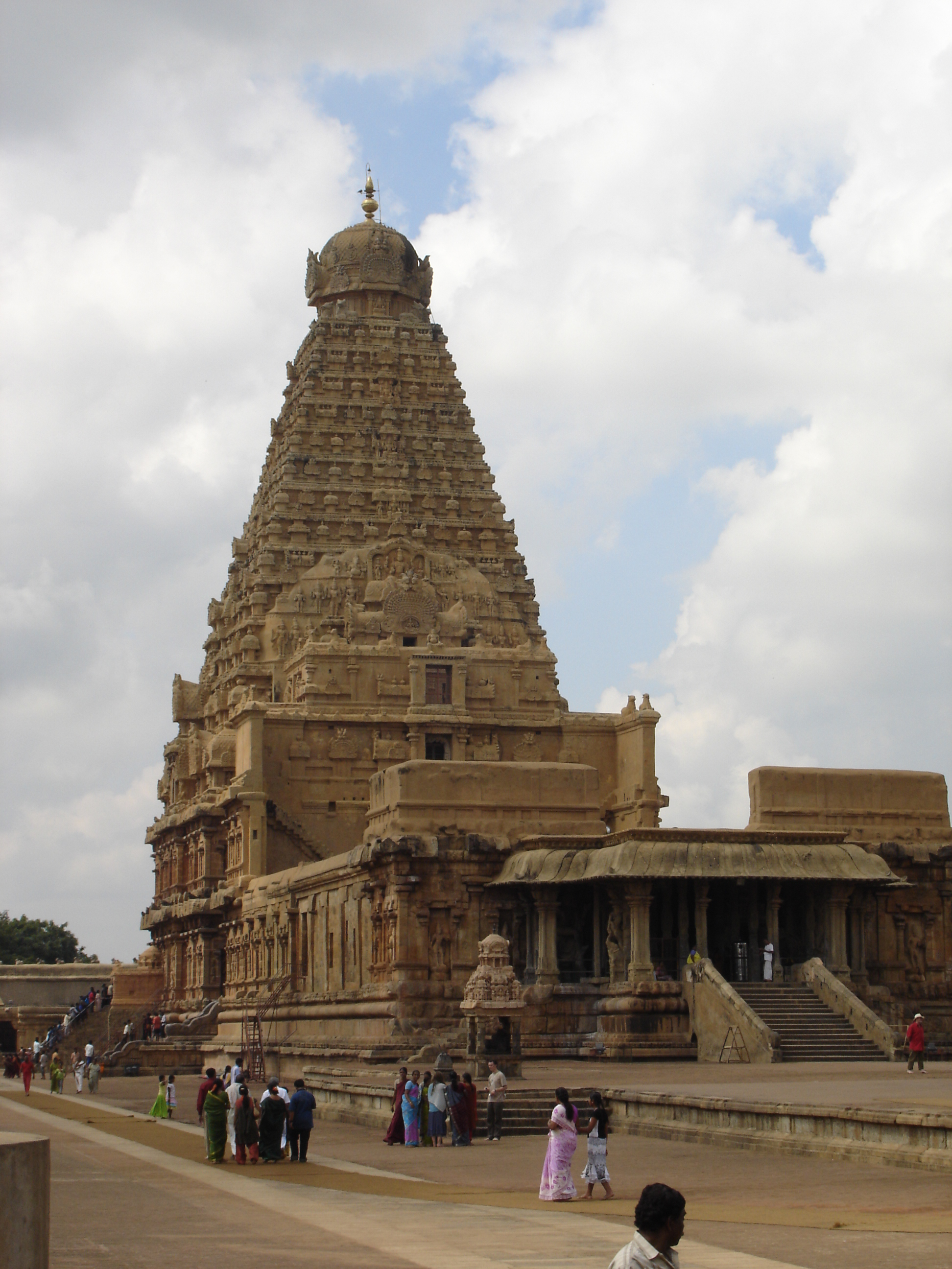 Templo Indiano Brihadeeswara em Tanjour